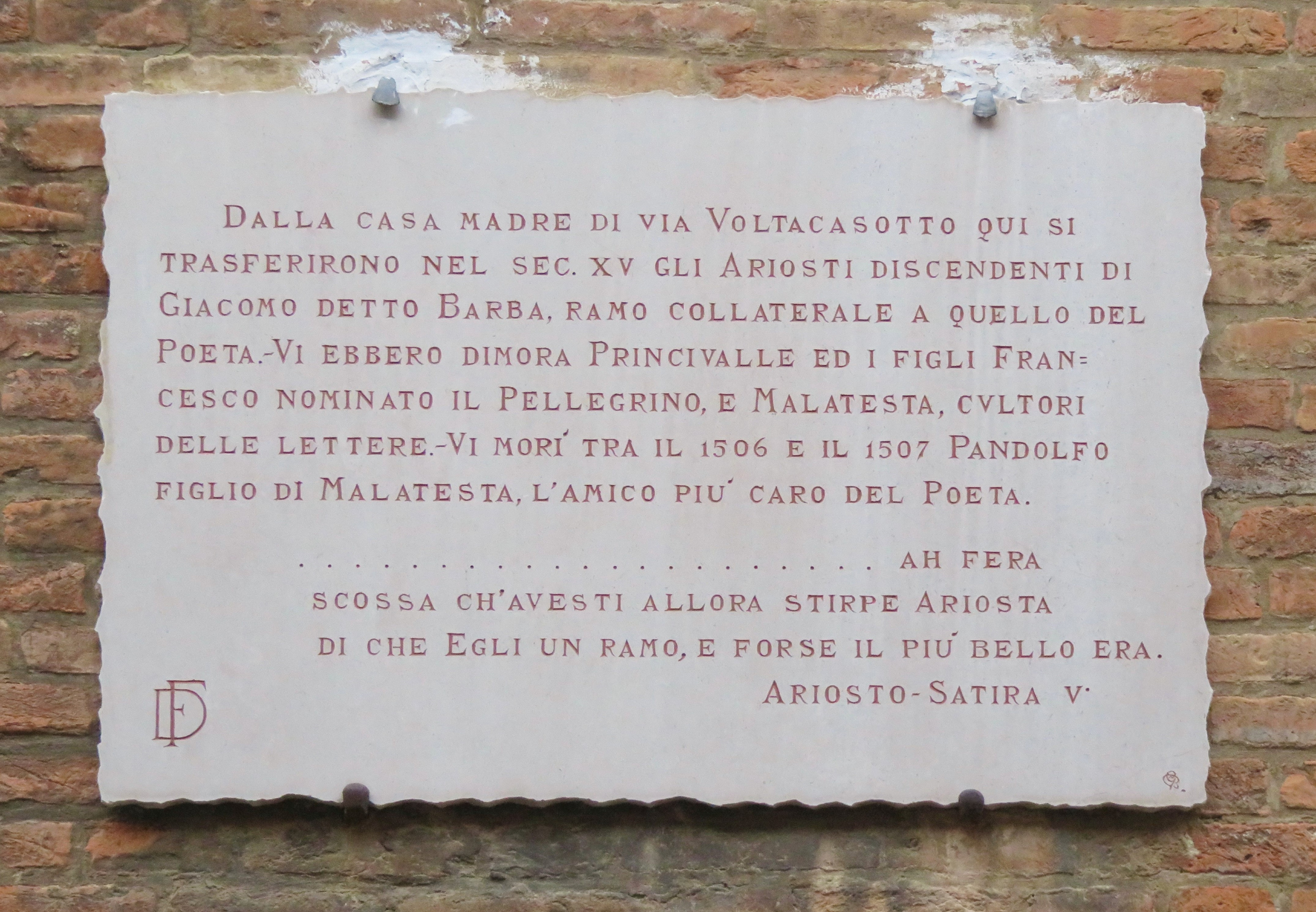 Epigrafe